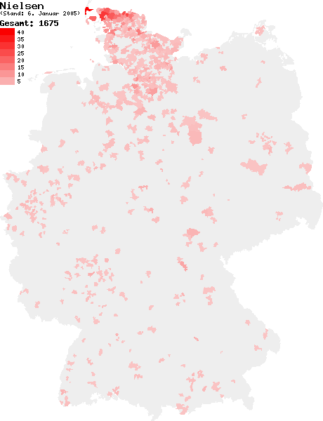 Verteilung des Nachnamens Nielsen in Deutschland nach dem Telefonbuch mit Stand vom 6. Januar 2005